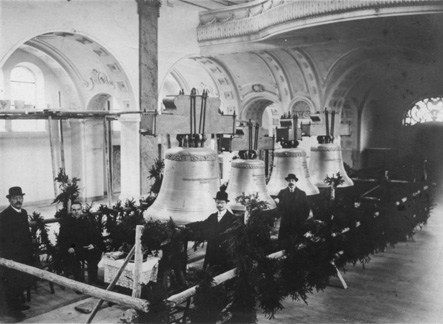 Aufstellung der Glocken